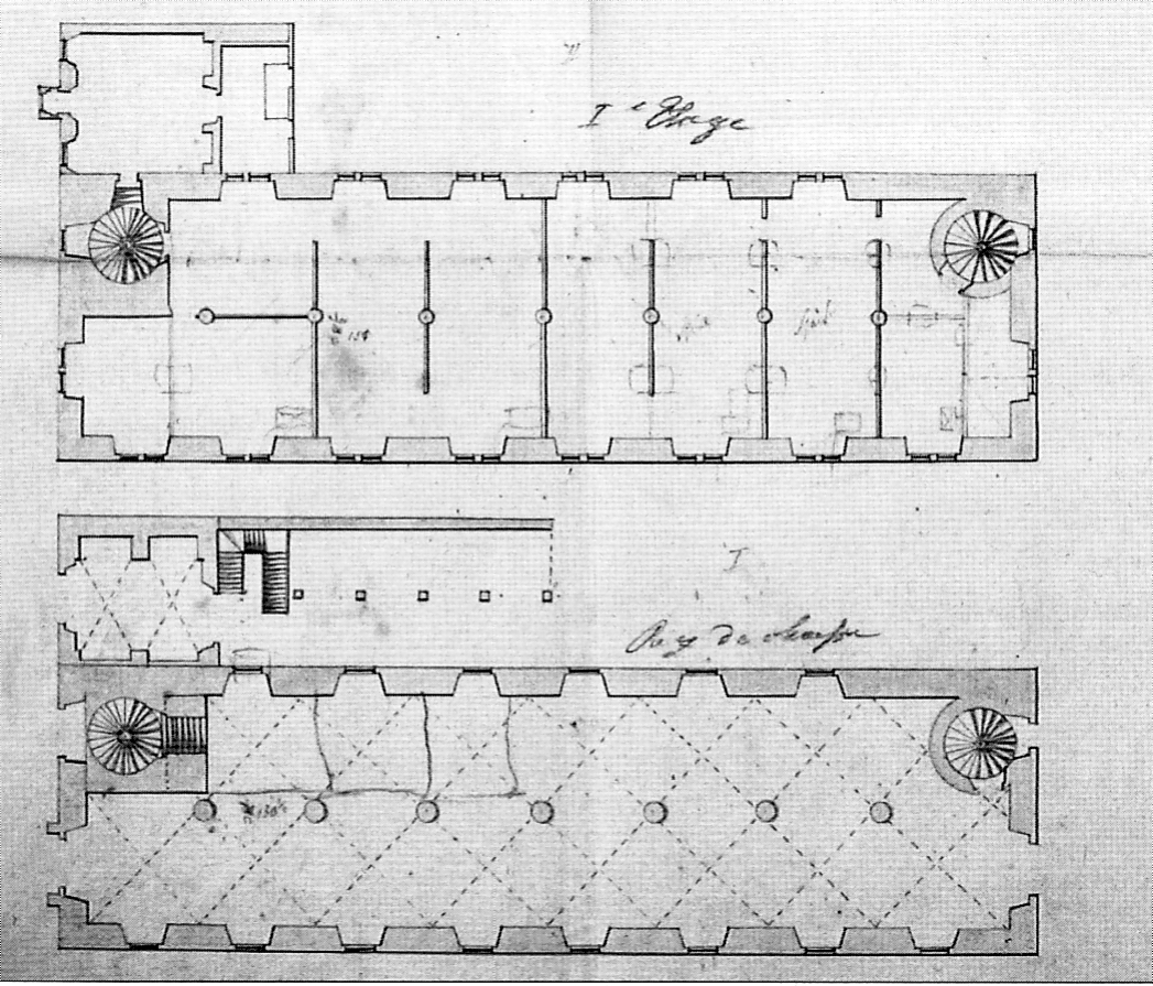 Plan von 1802 des hemaligen Zeughauses, heute Staatsarchiv Coburg (Erd-und 1. Obergeschoss) - Coburg, Bayern